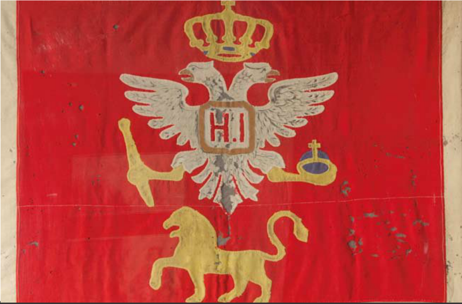 Srpski (latinica): Zastava Nikole I Petrovića (glavna ratna - alaj-barjak)